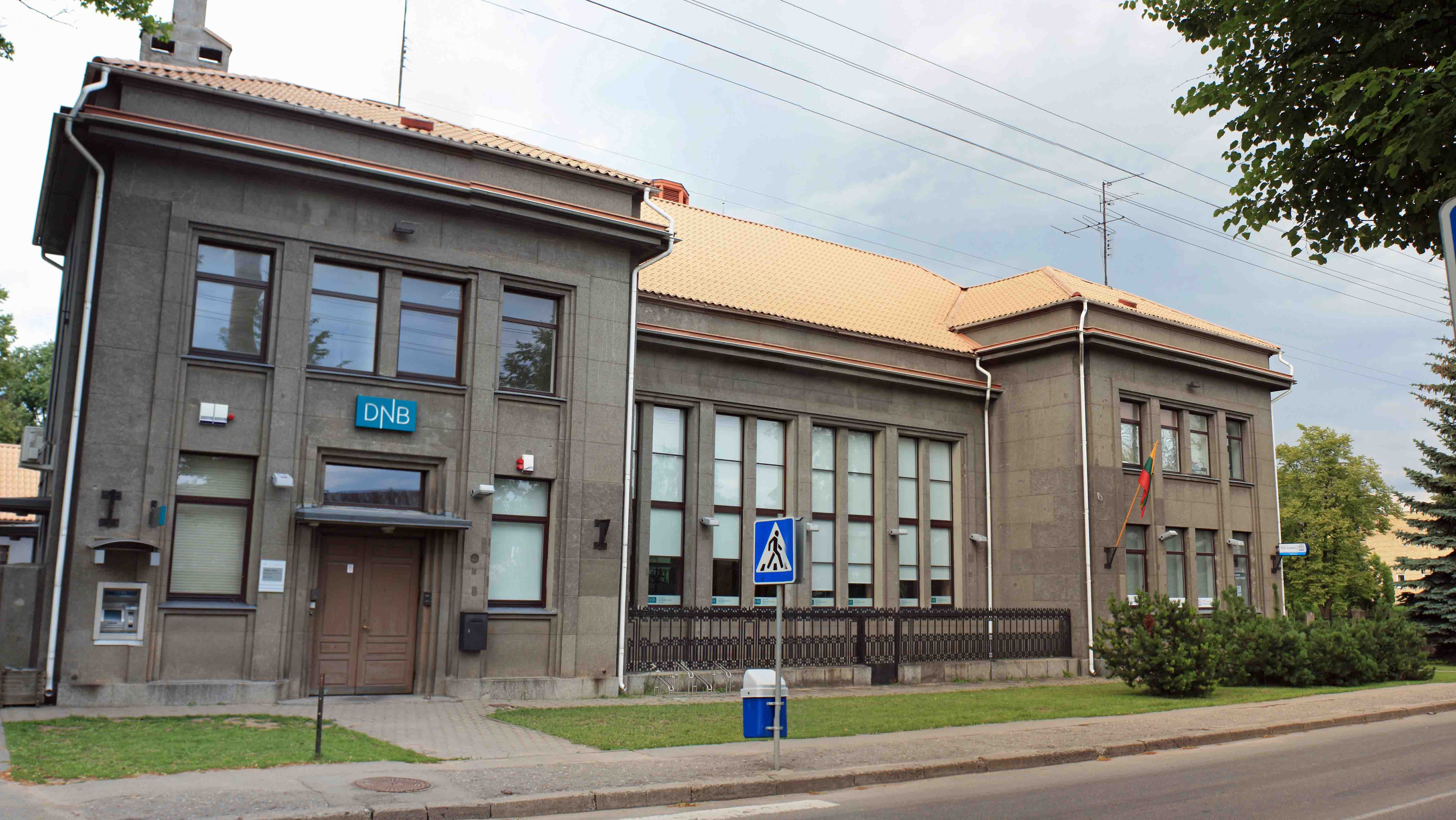 1936 m. Mykolo Songailos projektuotas Biržų bankas.